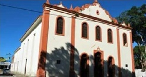 Catedral Nossa Senhora do Bom Sucesso, Cruz das Almas